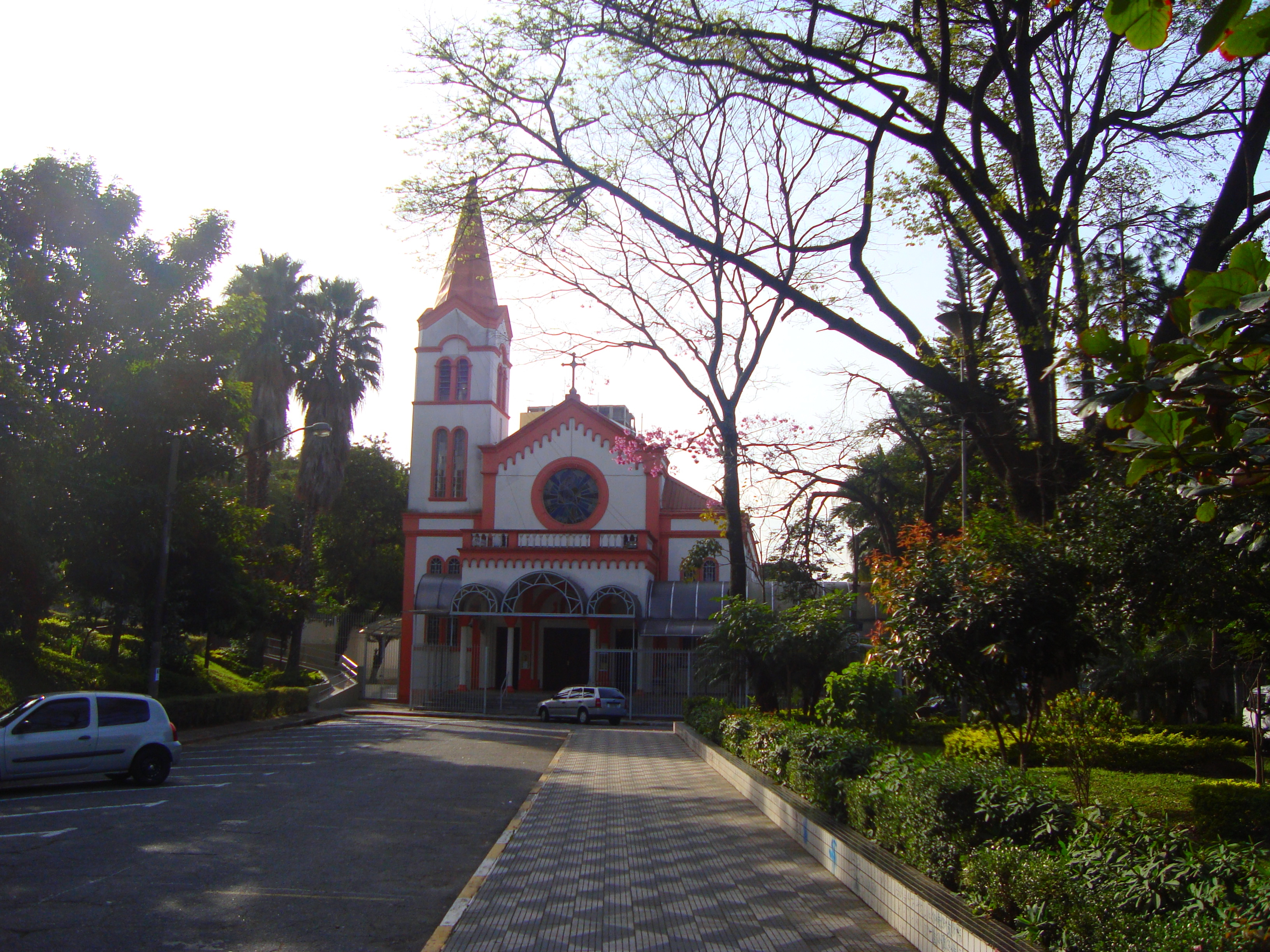 Foto da paróquia Santa Terezinha no bairro homônimo, distrito de Santana zona norte de São Paulo